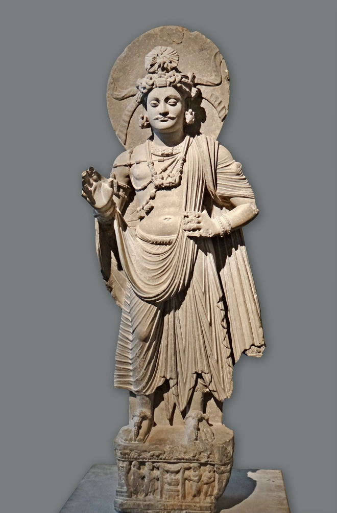 Bodhisattva debout 1er-3è siècle Pakistan région du Gandhara monastère de Shahbaz-Garhi